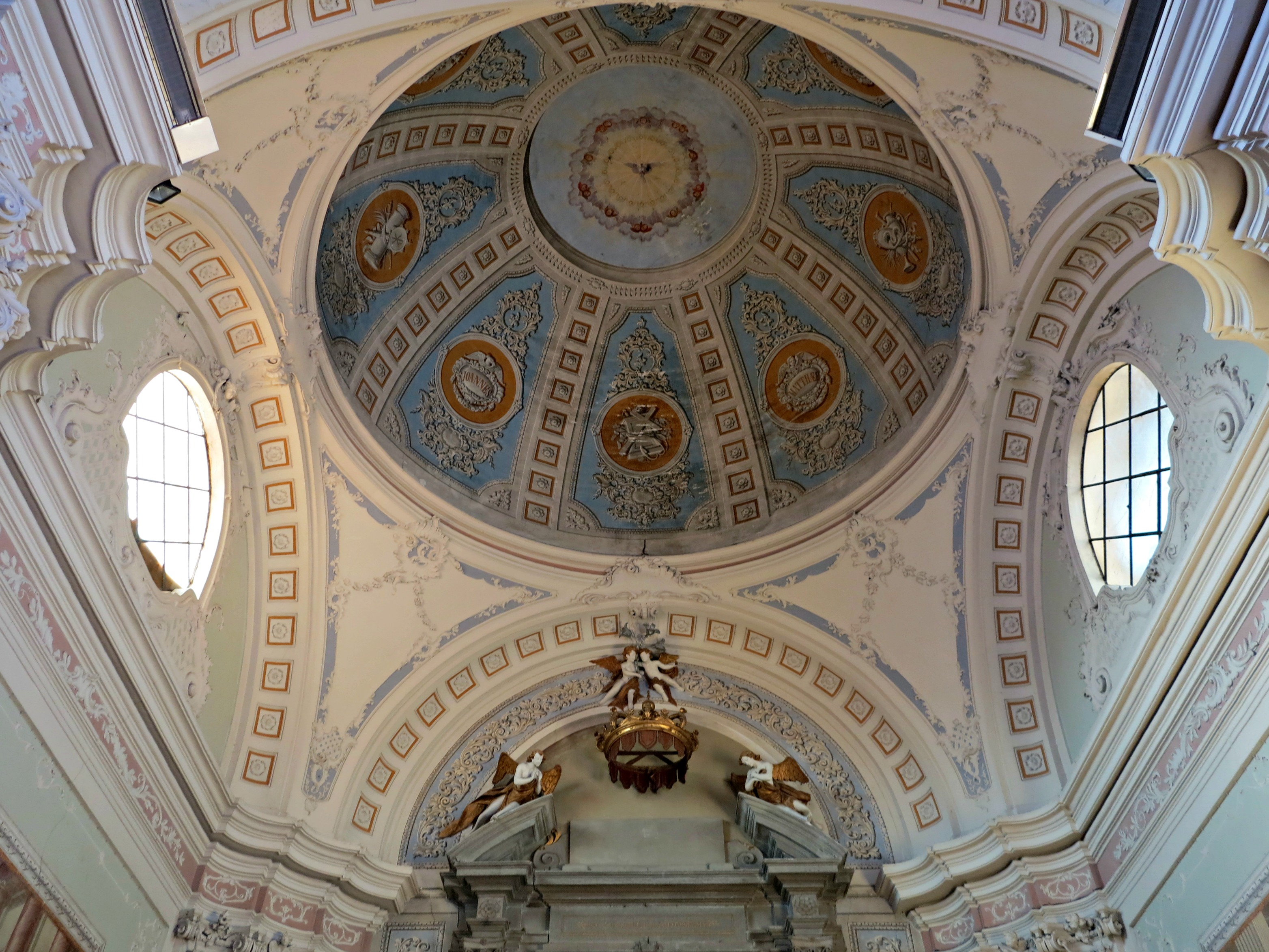 Cupola interna della chiesa della Santissima Annunziata, Barga